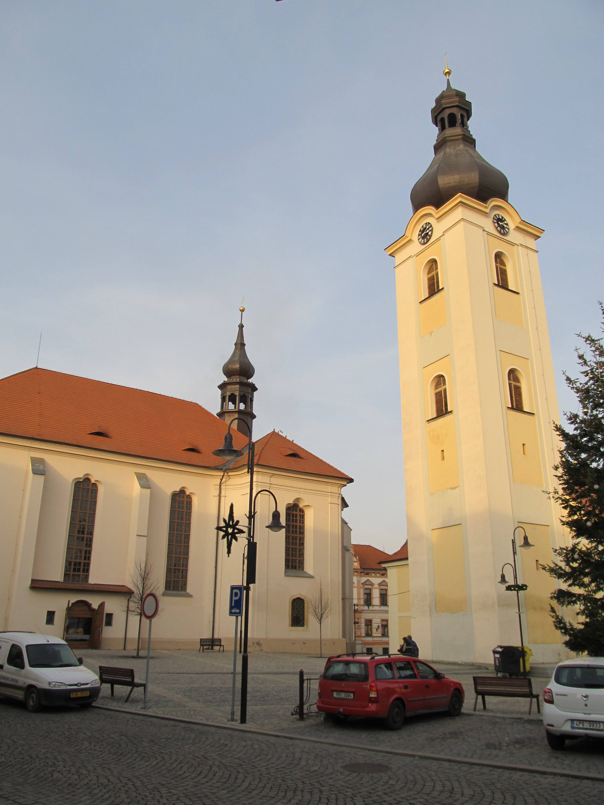 Dobřany - kostel svatého Mikuláše